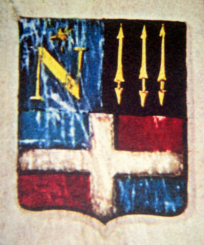 Stemma di Asti, da un documento napoleonico del 1811.